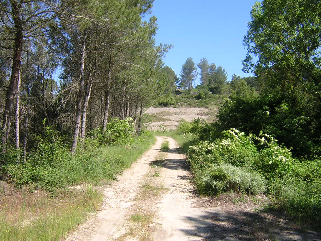 Camí damunt de la reclosa del Sot de Pumanyà (Monistrol de Calders, Moianès)